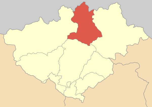 Община Осеница на картата на Ном Драма, Гърция Locator map of Sidironero community (Δήμος Κοινότητα Σιδηρόνερου) in Drama prefecture (Νομός Δράμας) in Greece.